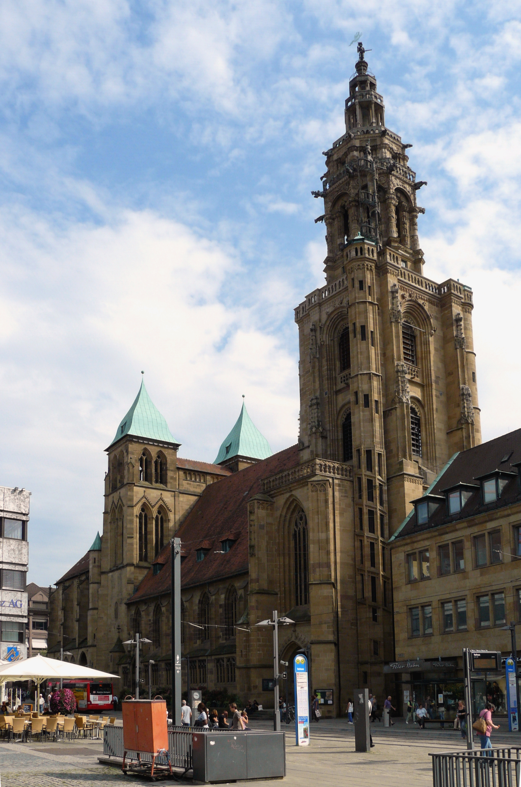 St.-Kilian-Kirche in Heilbronn